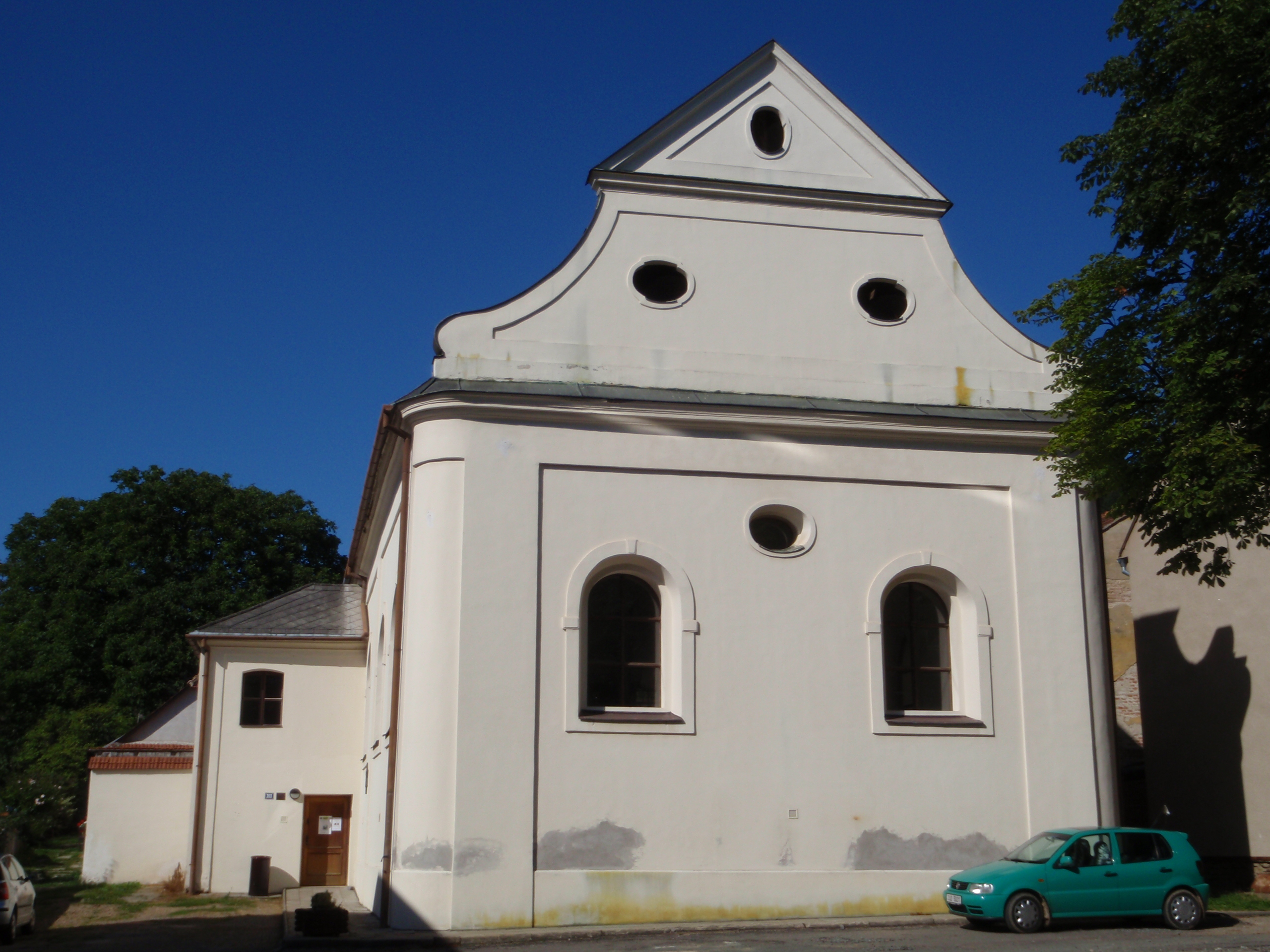 Lomnická synagoga.